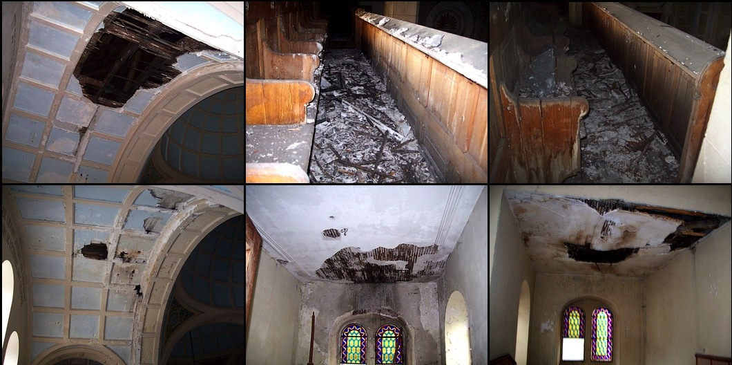 Thann la synagogue, état de la tribune et du plafond